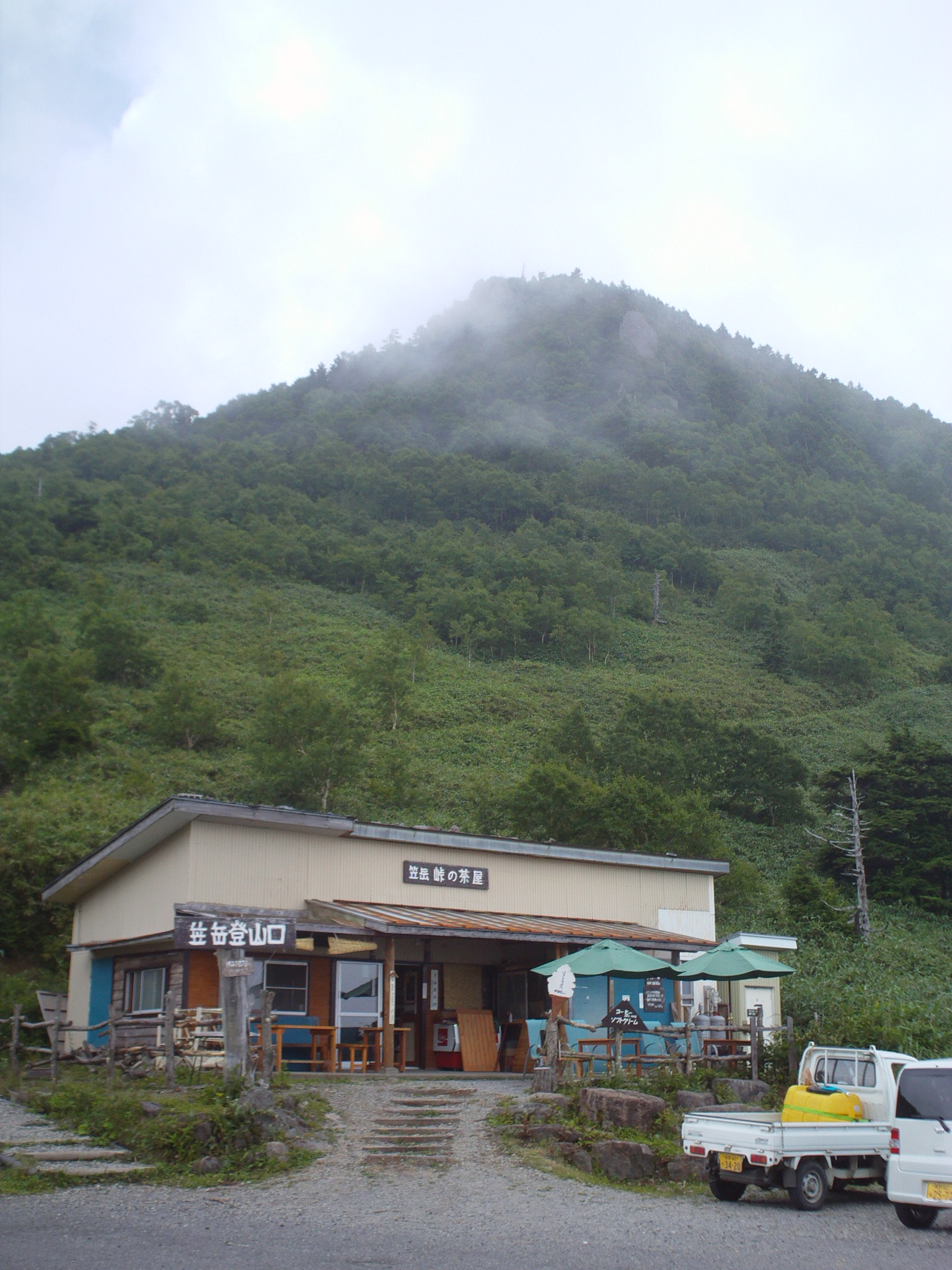 長野県道66号豊野南志賀公園線。笠岳峠の茶屋。笠岳登山口でもある。